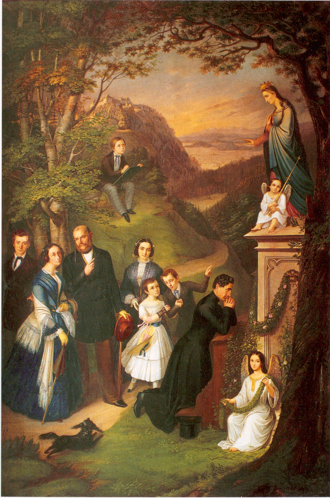 Fürst Constantin (1807 – 1862) mit seiner Familie von links: der älteste Erbgraf Wilhelm, Fürstin Maximiliane, Fürst Constantin, die Erzieherin Rose de Maisonneuve, Tochter Anna, Sohn Carl, Hauslehrer und Geistlicher Dr. Karl Lichtenstein. Im Hintergrund Sohn Constantin. Die verstorbenen Kinder Ottoline und Alexandrine sind als Engel dargestellt. Auf der Anhöhe Schloss Zeil. Ölgemälde